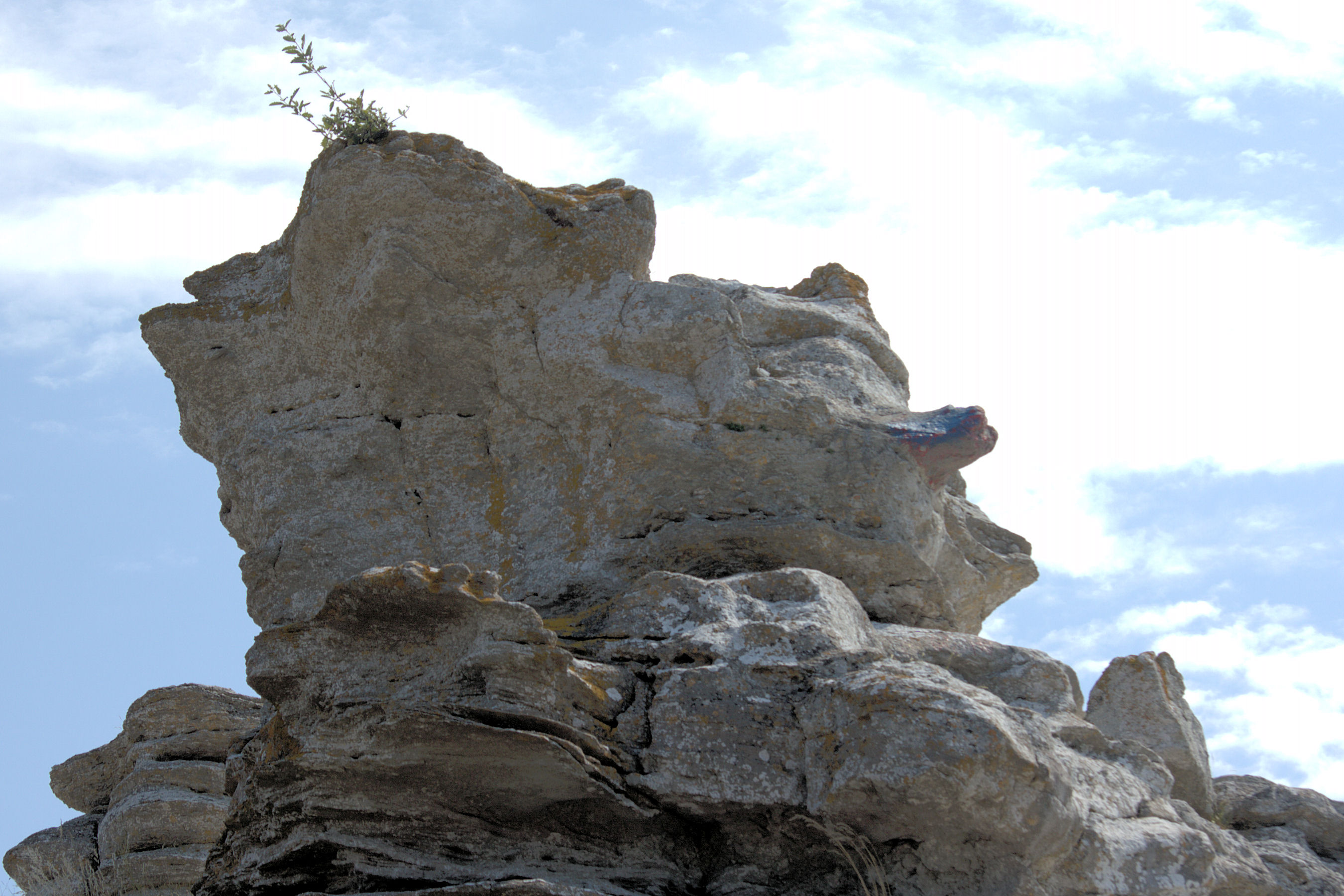 Hoburgsgubben, en rauk på södra Gotland, Sverige. Hoburgsgubben, a rauk on the south of Gotland, Sweden.